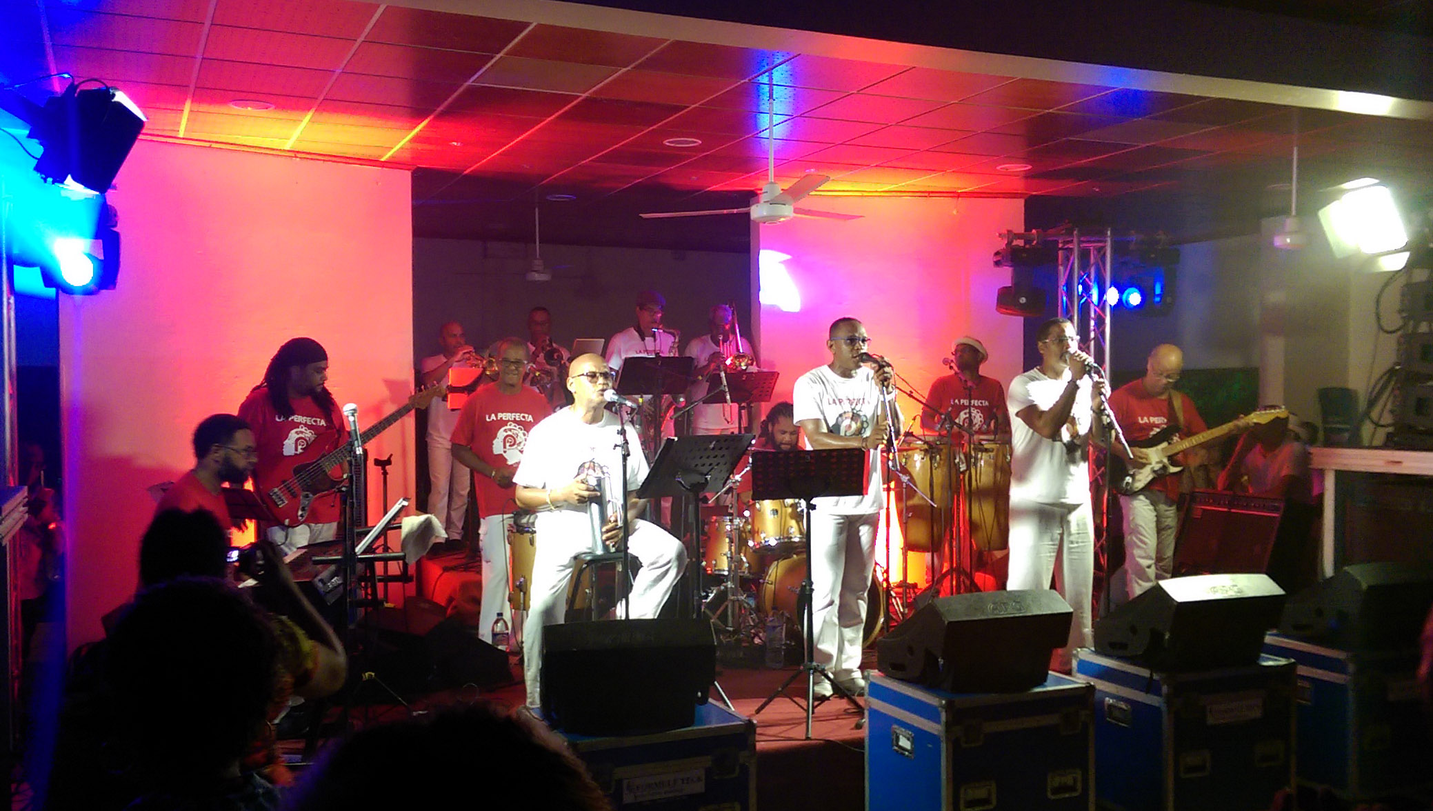 La Perfecta à l'Appaloosa - Le François - Martinique - 26/08/2016 en clôture des vacances